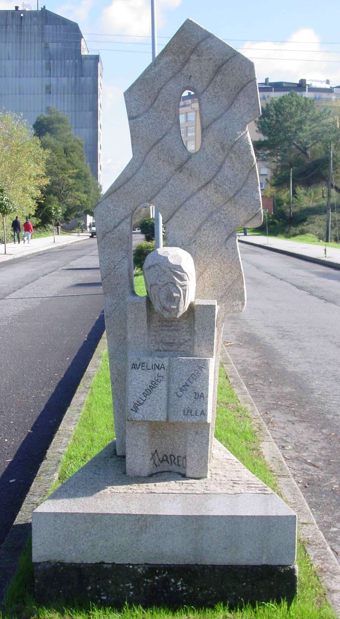 self made A Estrada - Galicia - Spain